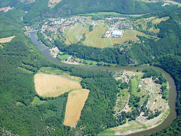 Letecký pohled na Křivoklátsko. Na snímku jsou Roztoky (v popředí osada Višňová), protéká zde meandrující Berounka.